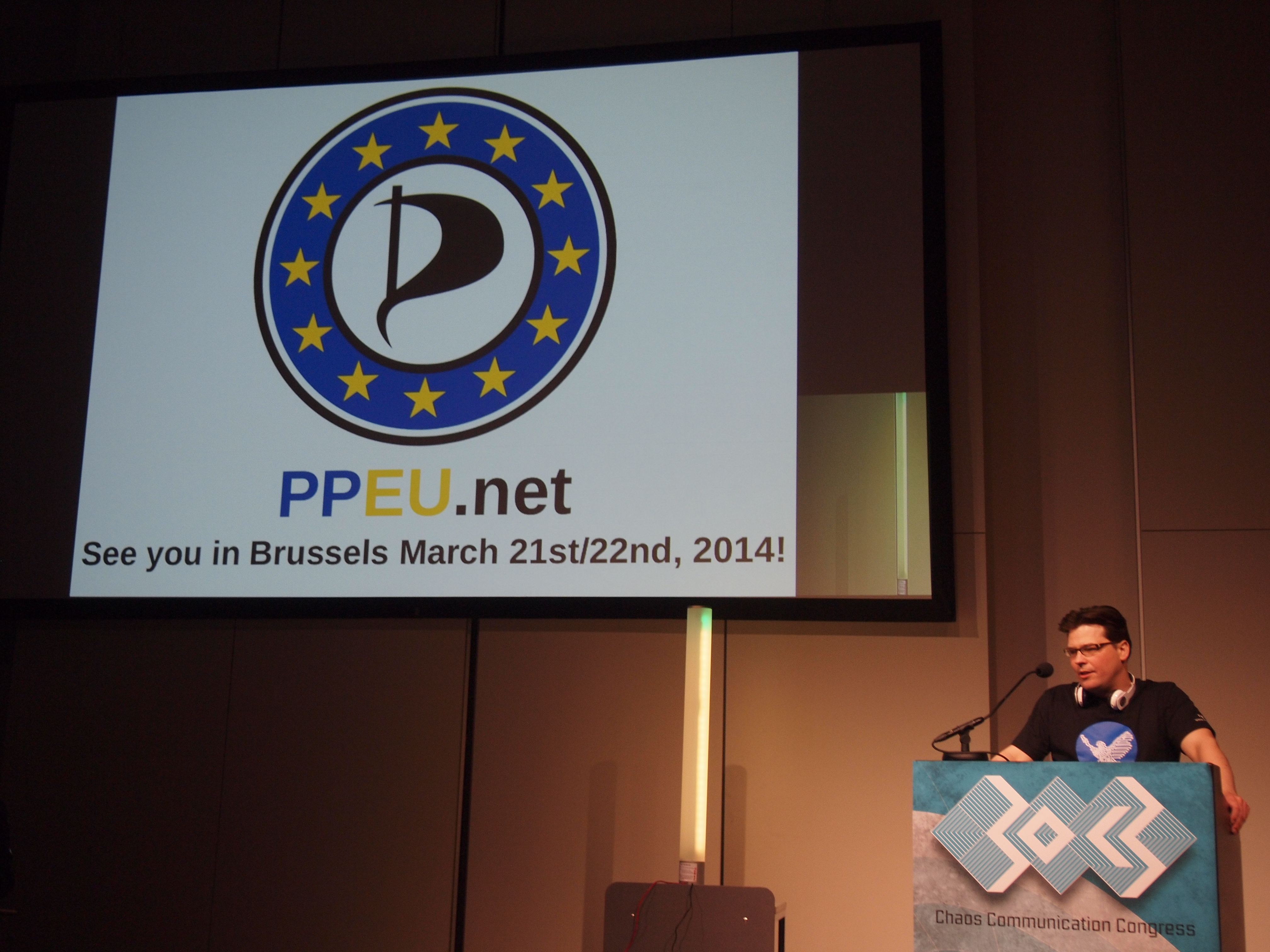 30C3: Jens Stomber stellt die Gründung der Europäischen Piratenpartei (PPEU) auf den Lightning Talks vor